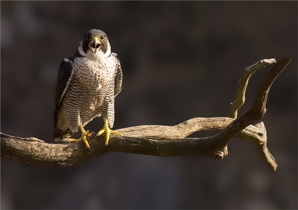 Wanderfalke (Falco peregrinus), Naturschutzgebiet „Weltenburger Enge“ (NSG 00089.01), Bayern